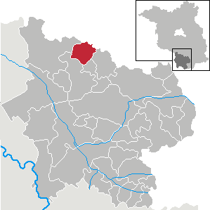 Lebusa in Brandenburg (Country) - District Elbe-Elster